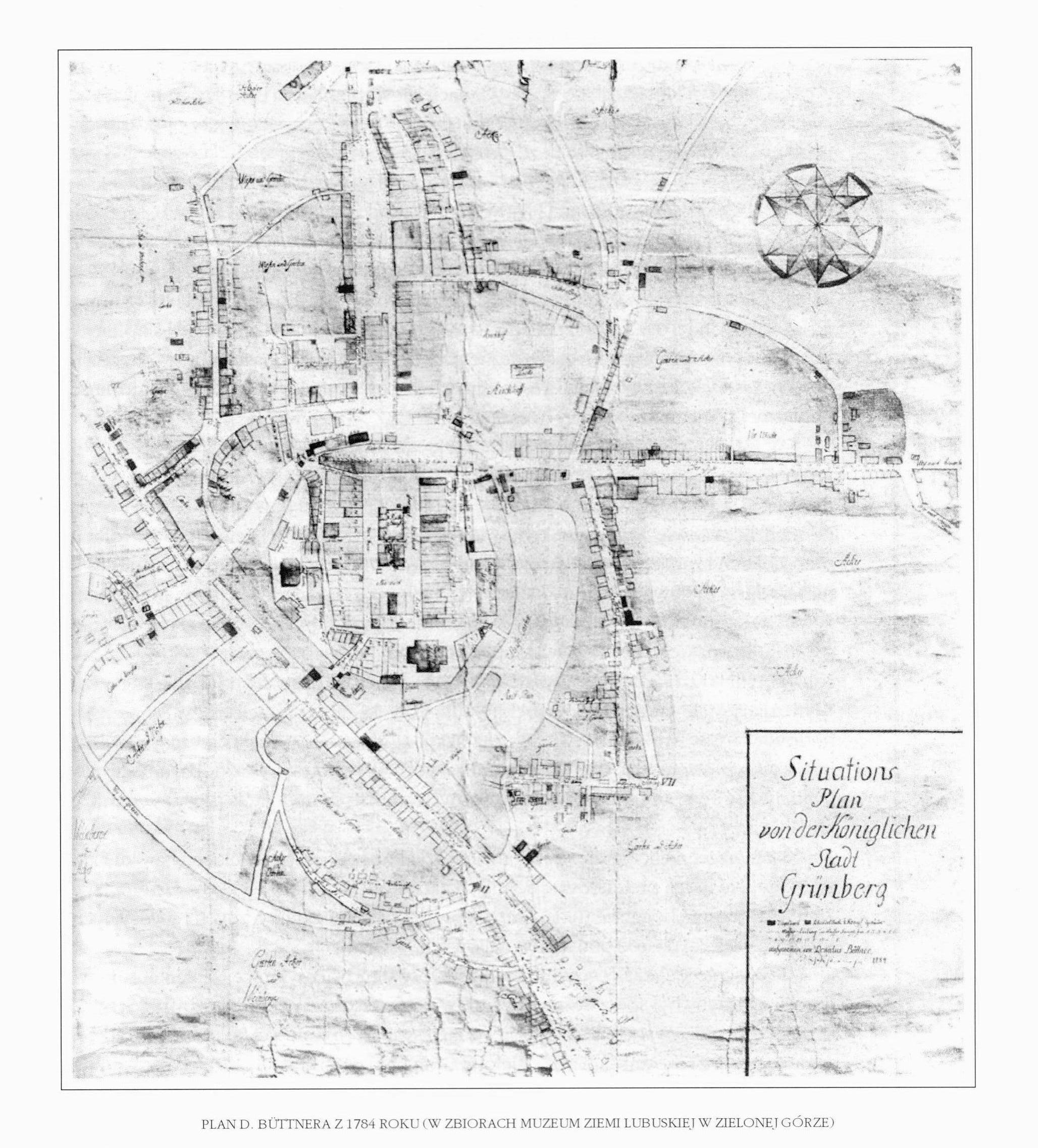 Plan Zielonej Góry D.Büttnera z 1784 roku, w zbiorach Muzeum Ziemi Lubuskiej w Zielonej Górze.